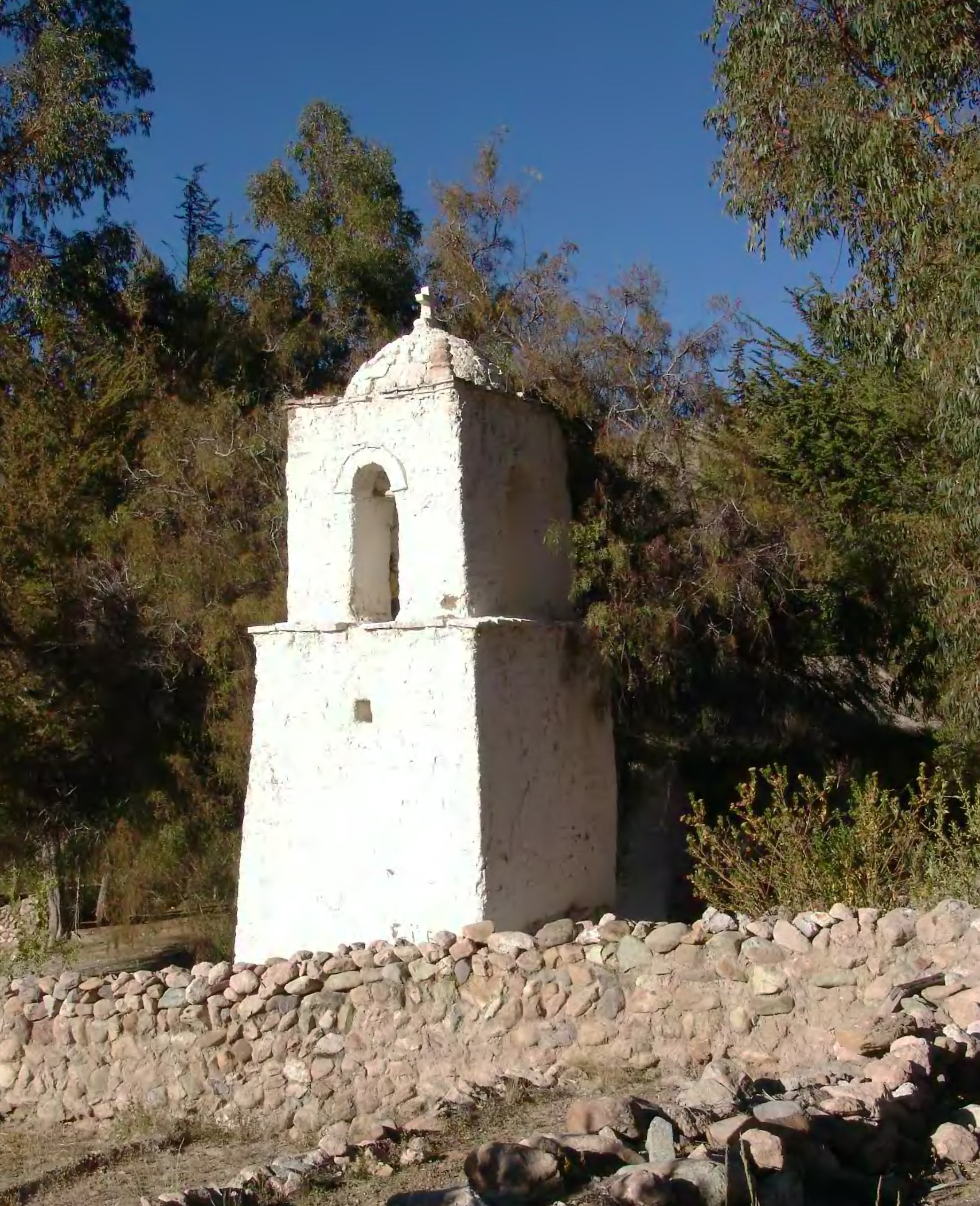 Iglesia de la Virgen de la Asunción de Ticnámar This is a photo of a national monument in Chile: 2229